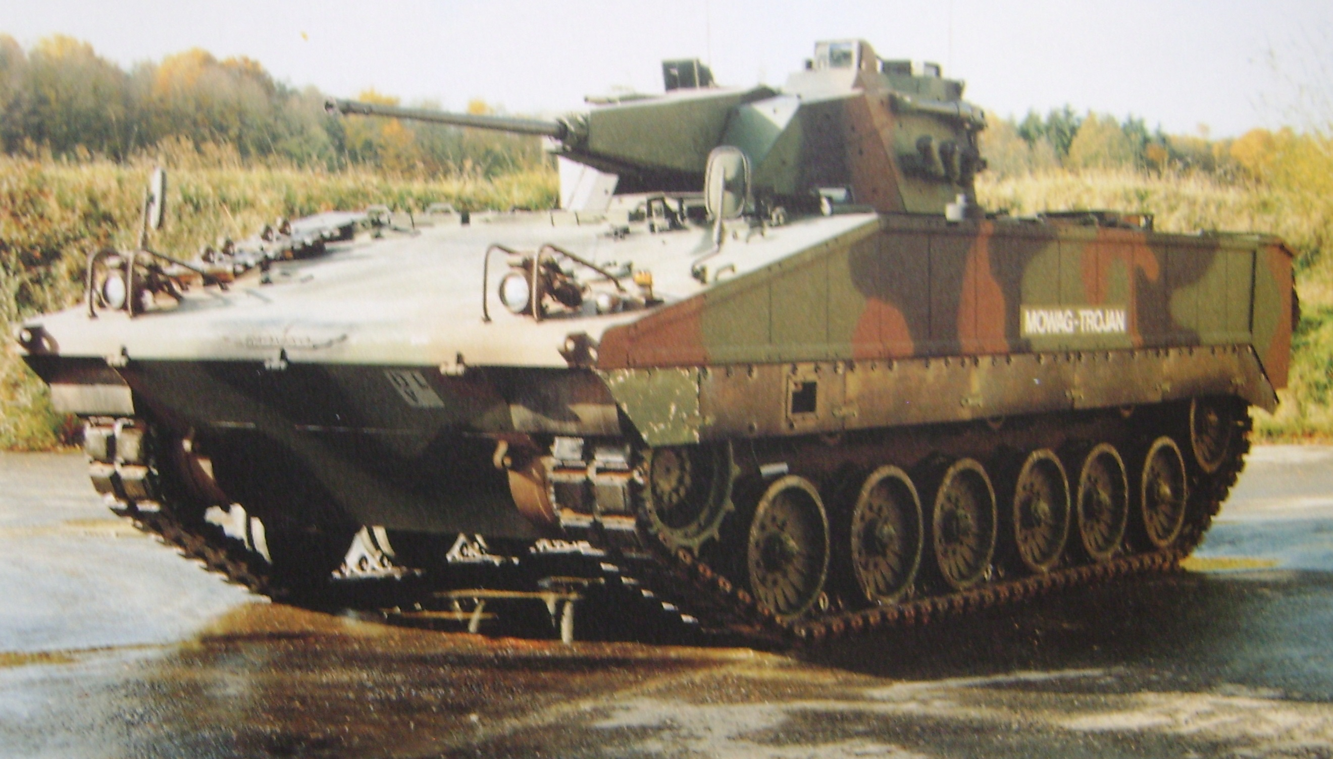 MOWAG TROJAN